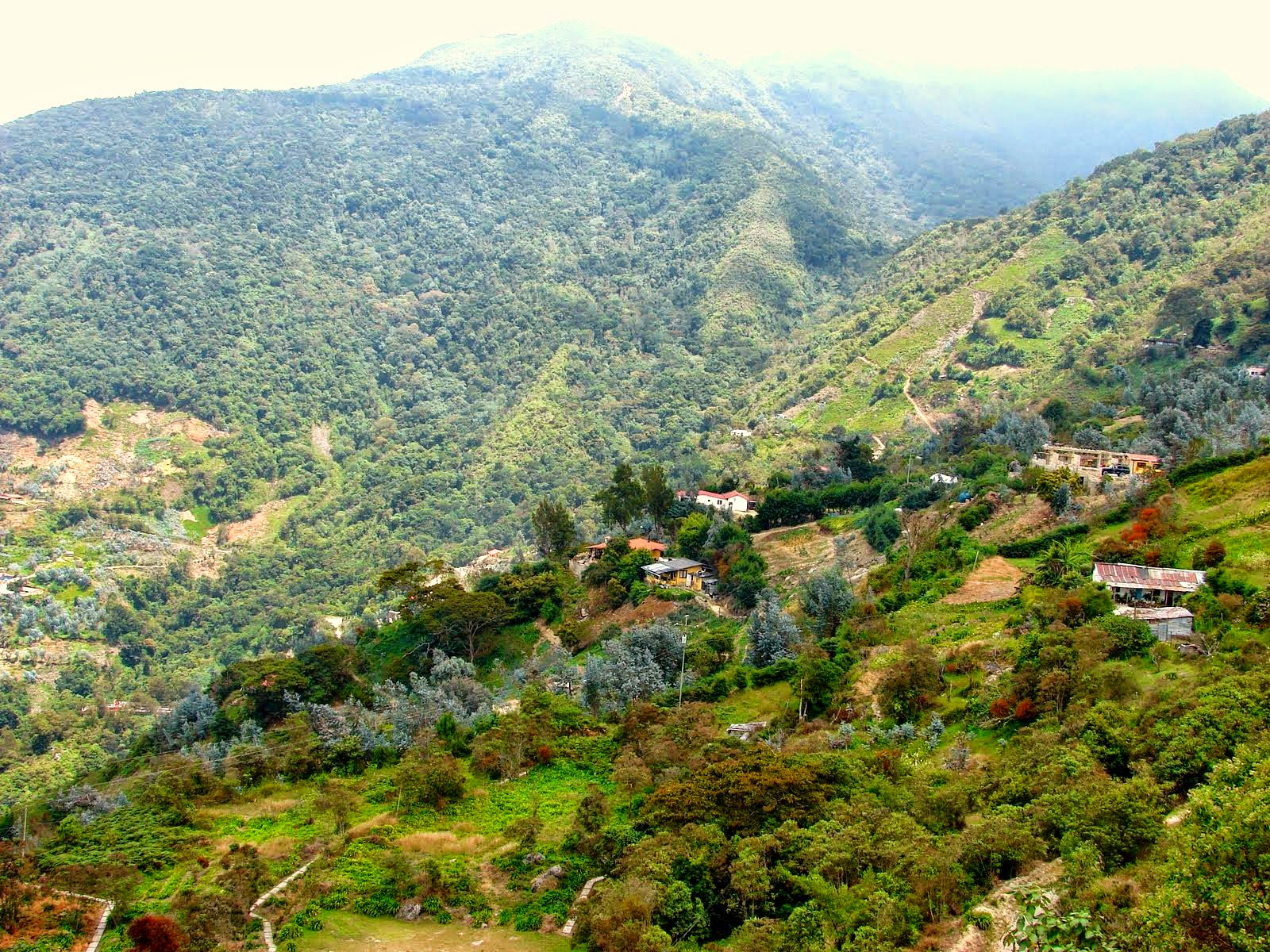 Huertos de Galipán, Parque Nacional El Avila, Edo Vargas, Venezuela